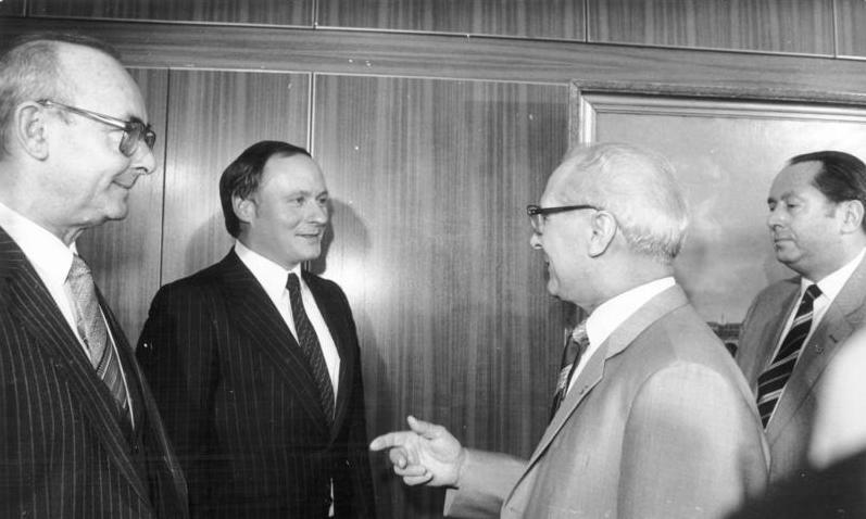 ADN-ZB / Mittelstädt / 16.3.82 Berlin: Der Generalsekretär des ZK der SED und Vorsitzende des Staatsrates der DDR, Erich Honecker, empfing den Oberbürgermeister von Saarbrücken (BRD), Oskar Lafontaine (2.v.l.), 1. Landesvorsitzender der SPD Saarland und Mitglied des SPD-Parteivorstandes, zu einem Gespräch. Zugegen waren Herbert Häber, Abteilungsleiter im ZK der SED (r.) und der stellvertretende saarländische SPD-Landesvorsitzende, Nobert Engel (l.). 1982/0316/40 N